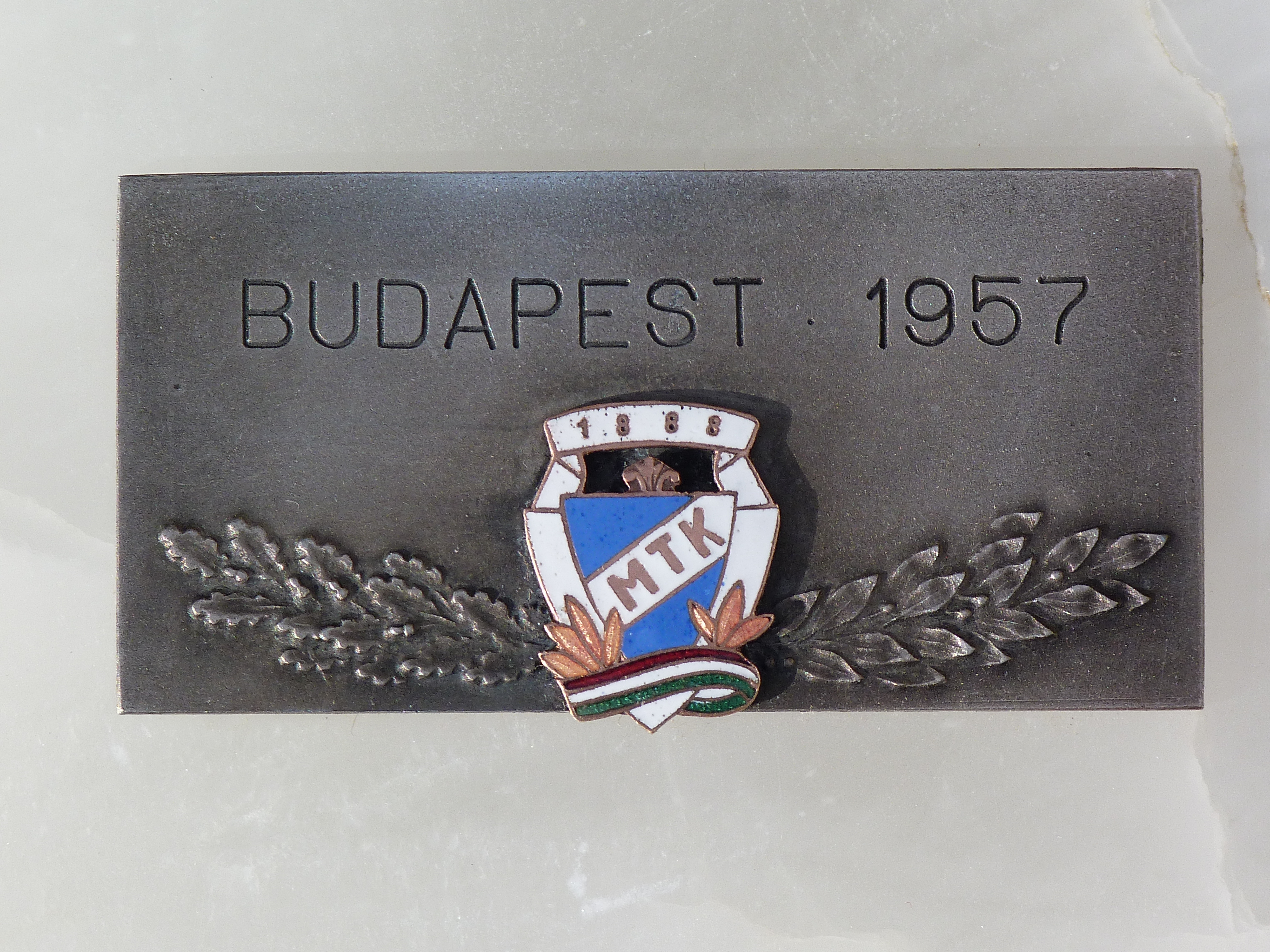 Live on the 11th of November, 2012. Marble with copper football, plakett with the emblem of the Magyar Testnevelők Köre (MTK) football club. During the 1956 freedom fight the tournament was delayed. Later on, spring 1957 the so called spring cup was held. MTK won the second prise after Újpest. This piece belong to Csopotiné Dr. Rácz Lili, chief accountant of the Club at the time ©© Published under Creative Commons in the Metapolisz DVD line. All of the photos and vids in the Metapolisz DVD line are under Creative Commons and can be used even for commercial – for profit – purposes. Recommended Citation Derzsi Elekes Andor: Metapolisz DVD line Tags: football Magyar Testnevelők Köre MTK 1957 Budapest Magyarország Metapolisz Tavaszi Bajnokság - Budapest 1957 A felvétel 2012. november 11 -én készült. Márvány alap (9,6 cm x 14,8 cm x 2,2 cm), réz futball labdával (átmérő 5,3 cm), fém plakett jelvénnyel (felirat: BUDAPEST 1957 és 1988 MTK). A szabadságharc alatt félbeszakadt 1956 –os idényt követően, az 1957-es szezonban már újra MTK néven szerepelt a sportklub. (Magyar Testgyakorlók Köre volt a klub neve 1888 és 1926 között). Visszatért a kispadra Bukovi Márton edző is. Ebben a "tavaszi" bajnokságban második helyen végeztek a kék-fehérek, a góllovőlista második helyezettje Hidegkuti Nándor. A klub legendás labdarúgója az edzőségre készült és Bukovi segítőjeként dolgozta végig a szezont. Az emléklap Csopotiné Dr. Rácz Lilinek, a Klub főkönyvelőjének tulajdona volt ©© Megjelent Creative Commons alatt a Metapolisz sorozatban. A Metapolisz sorozat valamennyi képe és filmje Creative Commons alatti valamint kereskedelmi - for profit - célra is felhasználható. Ajánlott hivatkozás: Derzsi Elekes Andor: Metapolisz DVD line Cimkék: 1957-es magyar labdarúgó-bajnokság (első osztály) Csopotiné Dr. Rácz Lili főkönyvelő